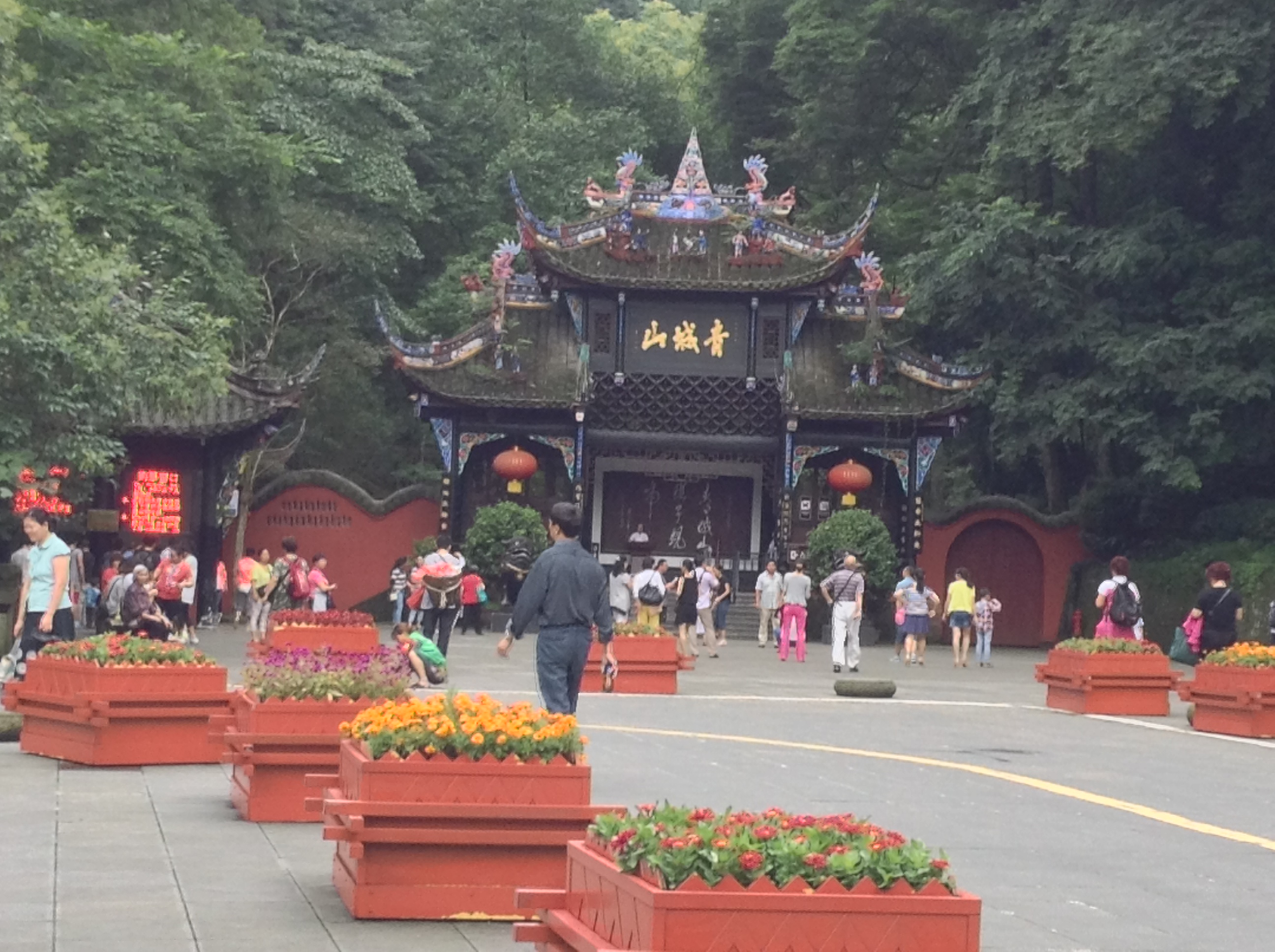 中文（中国大陆）: 青城前山山门